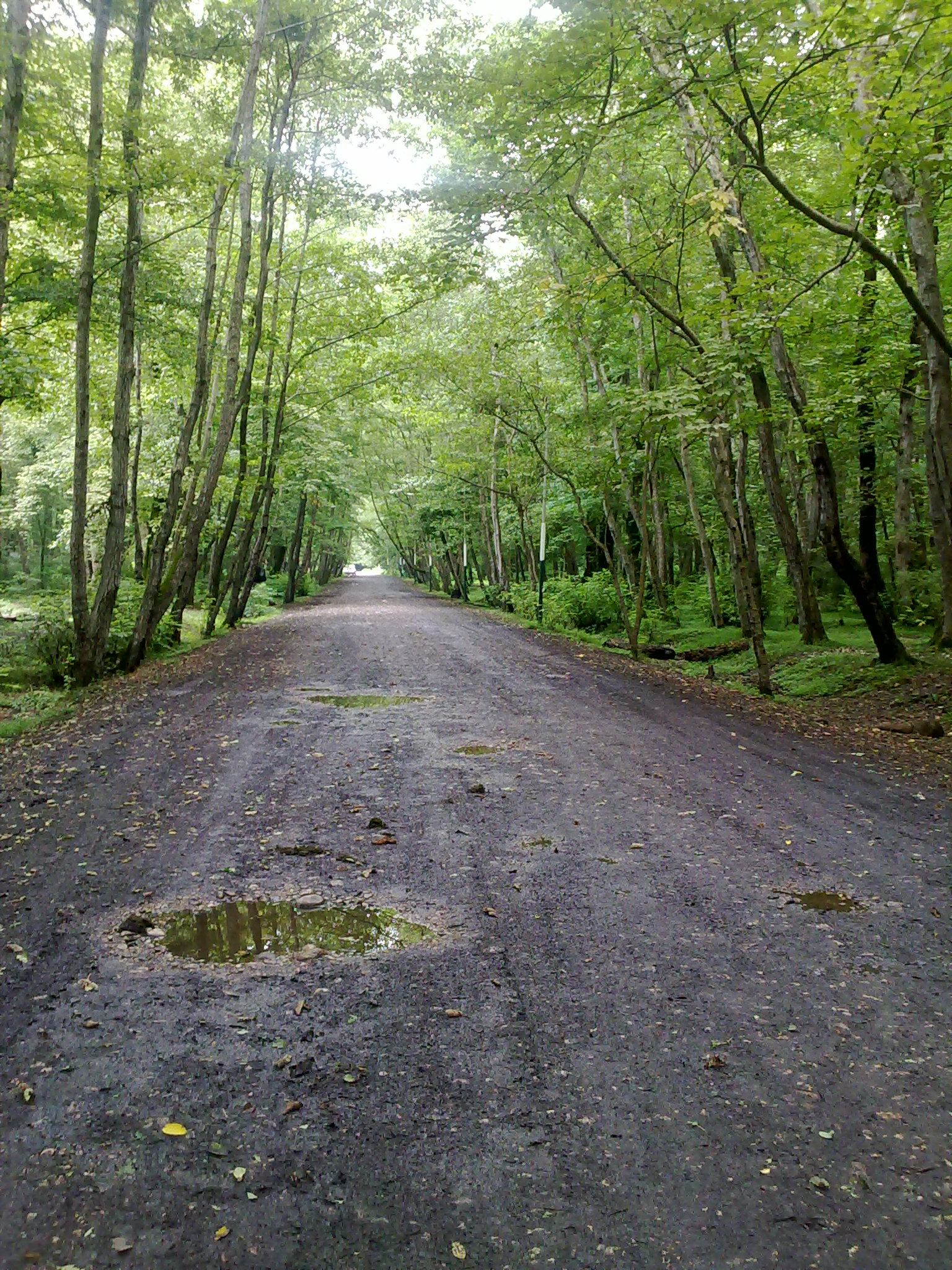 رژه درختان ...... پارک جنگلی نور